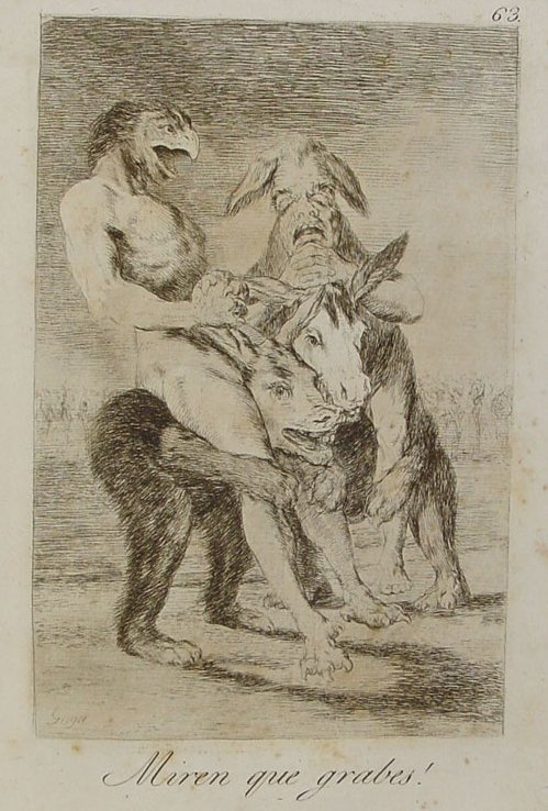 Capricho nº 63: ¡Miren que graves! de Goya, serie Los Caprichos